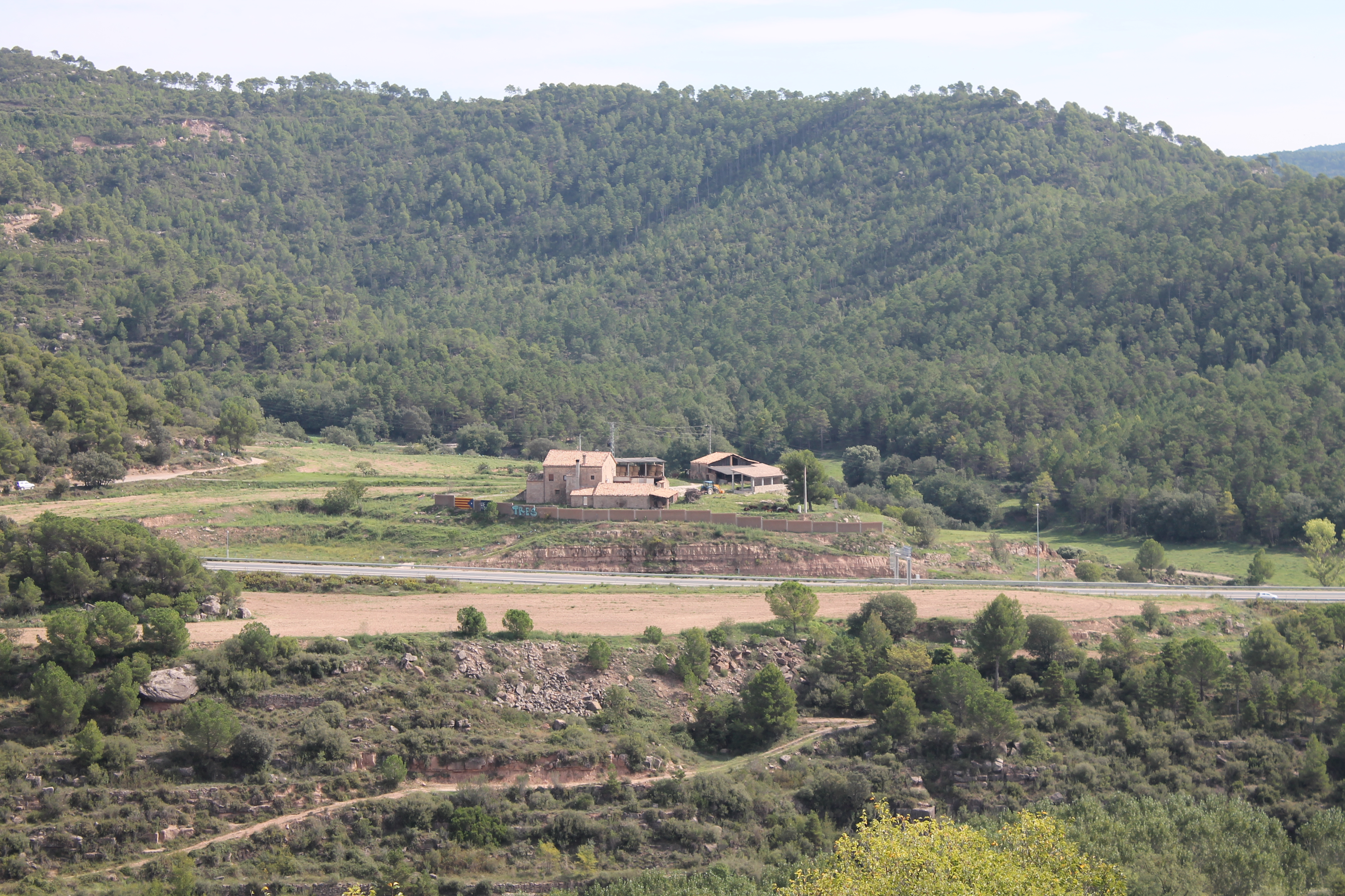 Casa de Les Comes vista des del Castell de Puig-reig.